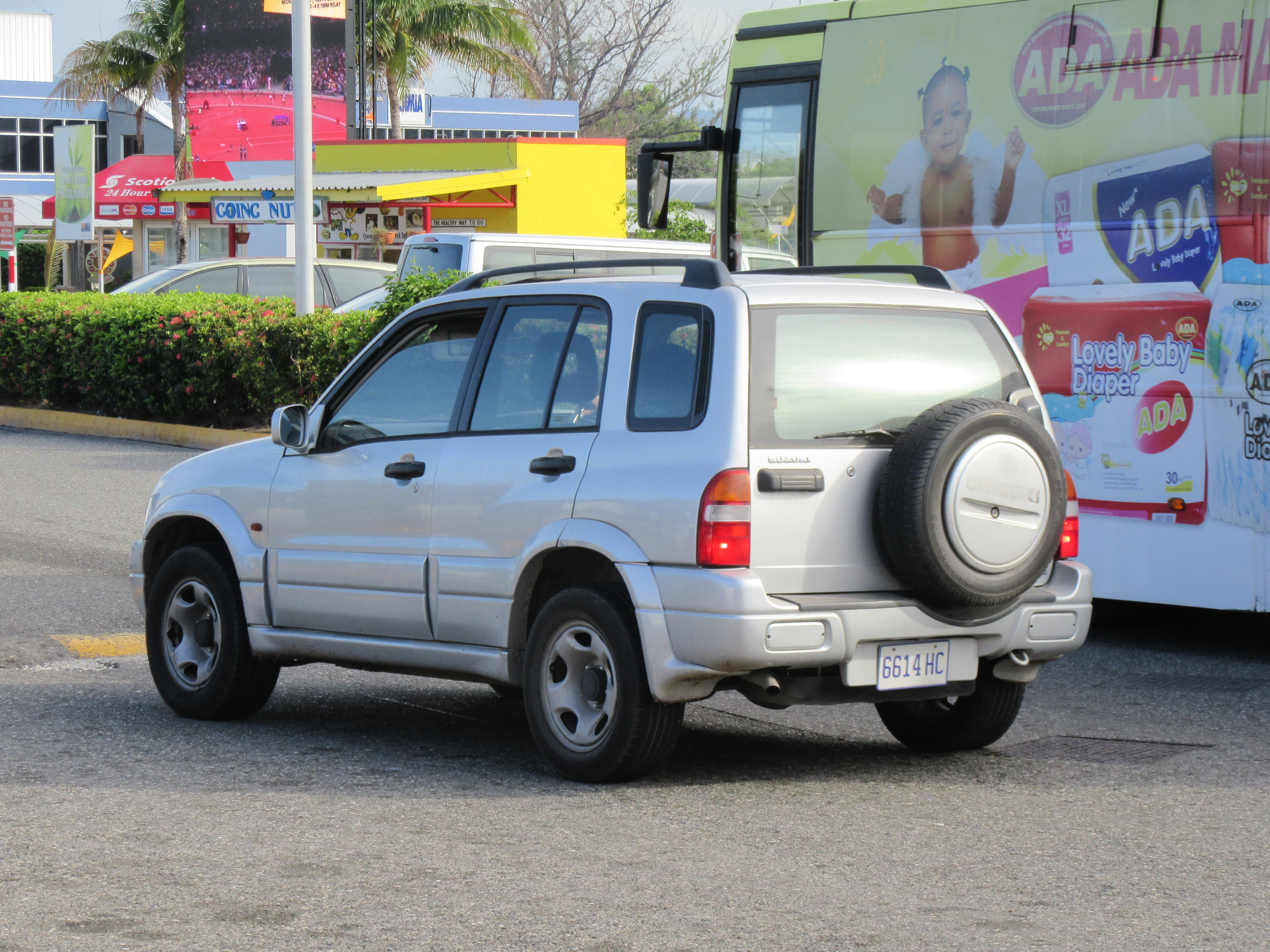 Suzuki Grand Vitara in Jamaica